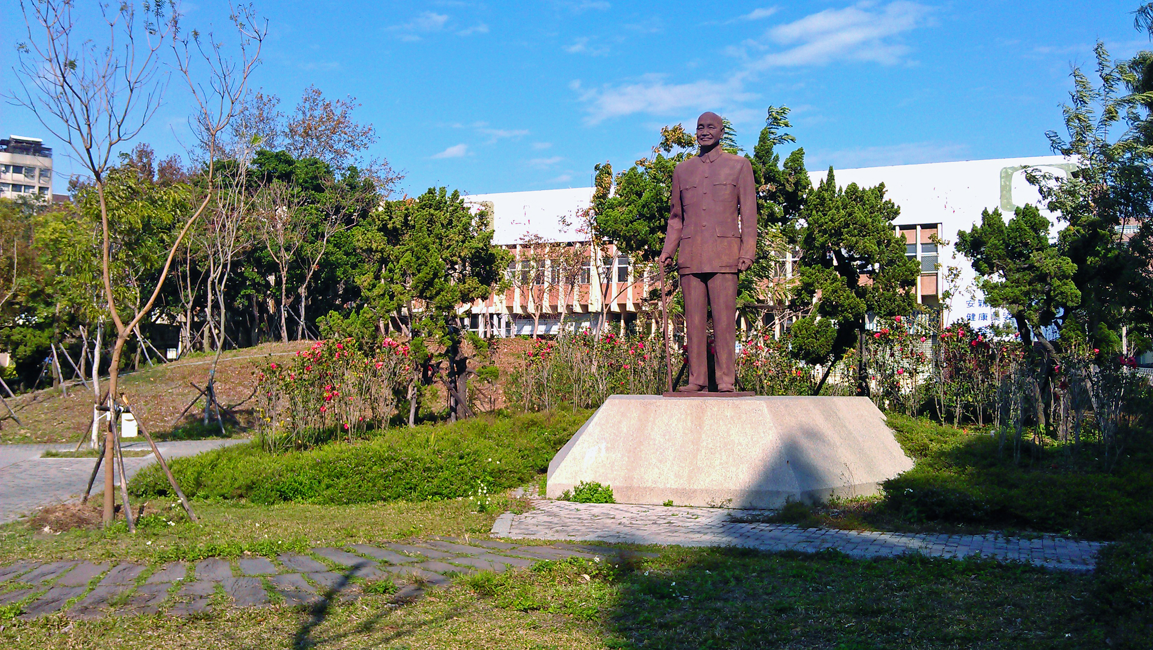 臺中北區中正公園